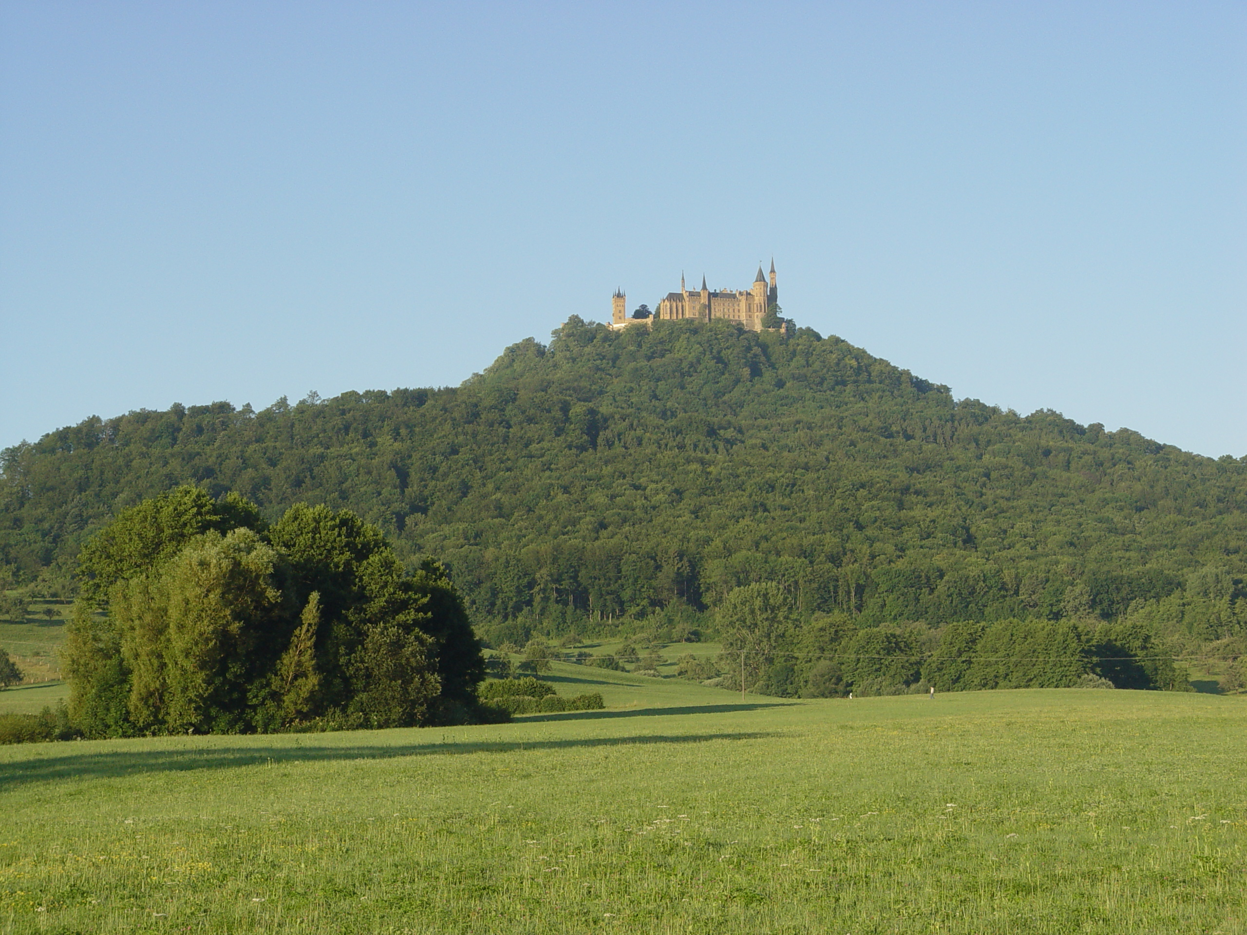 Burg Hohenzollern kurz nach Sonnenaufgang